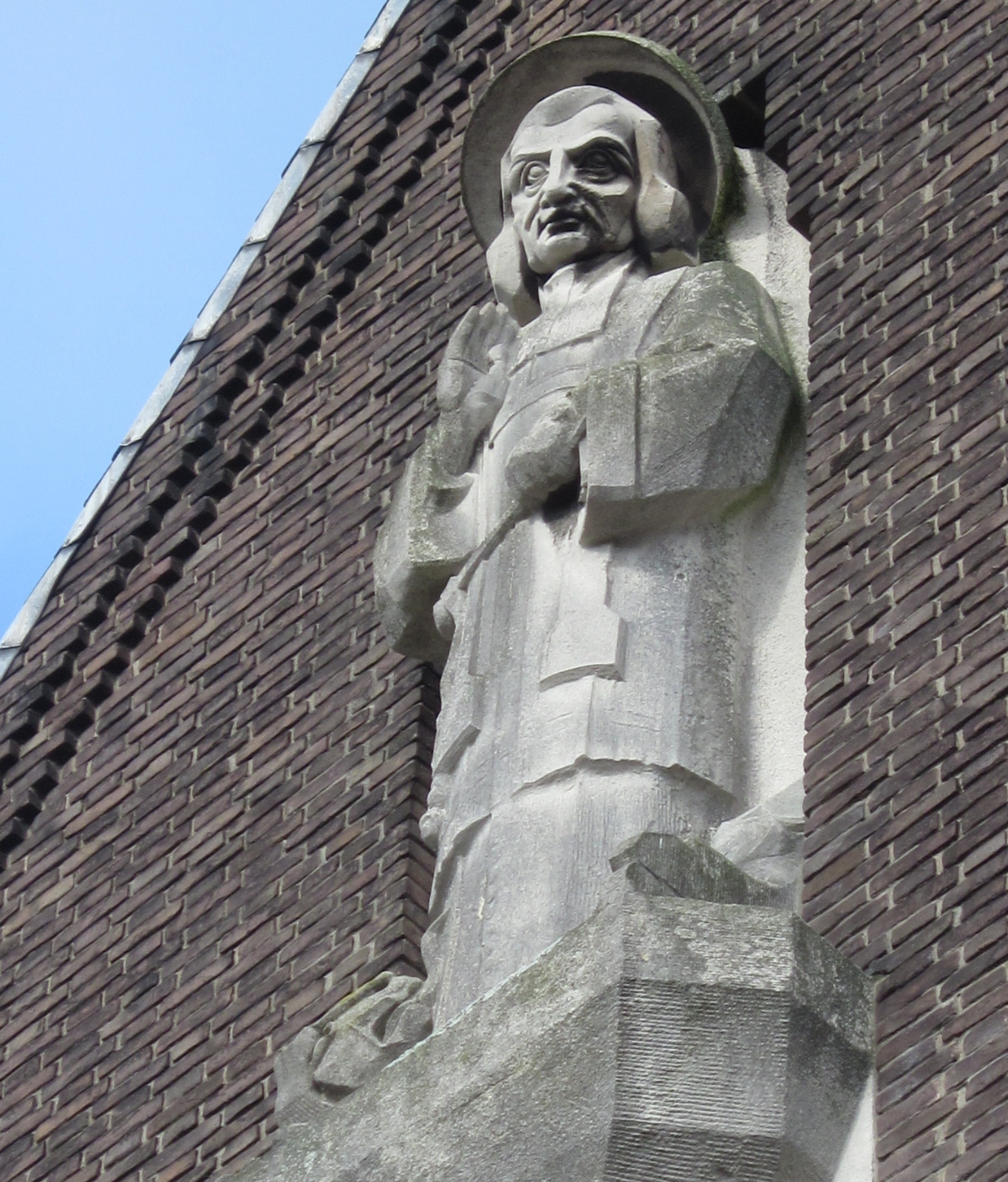 Beeld van patroonheilige aan de gevel van de Johannes Vianneykerk aan de Rielerweg 71 te Deventer. Het beeld uit ca. 1930 is van natuursteen en ongeveer levensgroot. Vianney, ook wel genoemd Pastoor van Ars, werd in 1925 door de Rooms-katholieke kerk heilig verklaard.